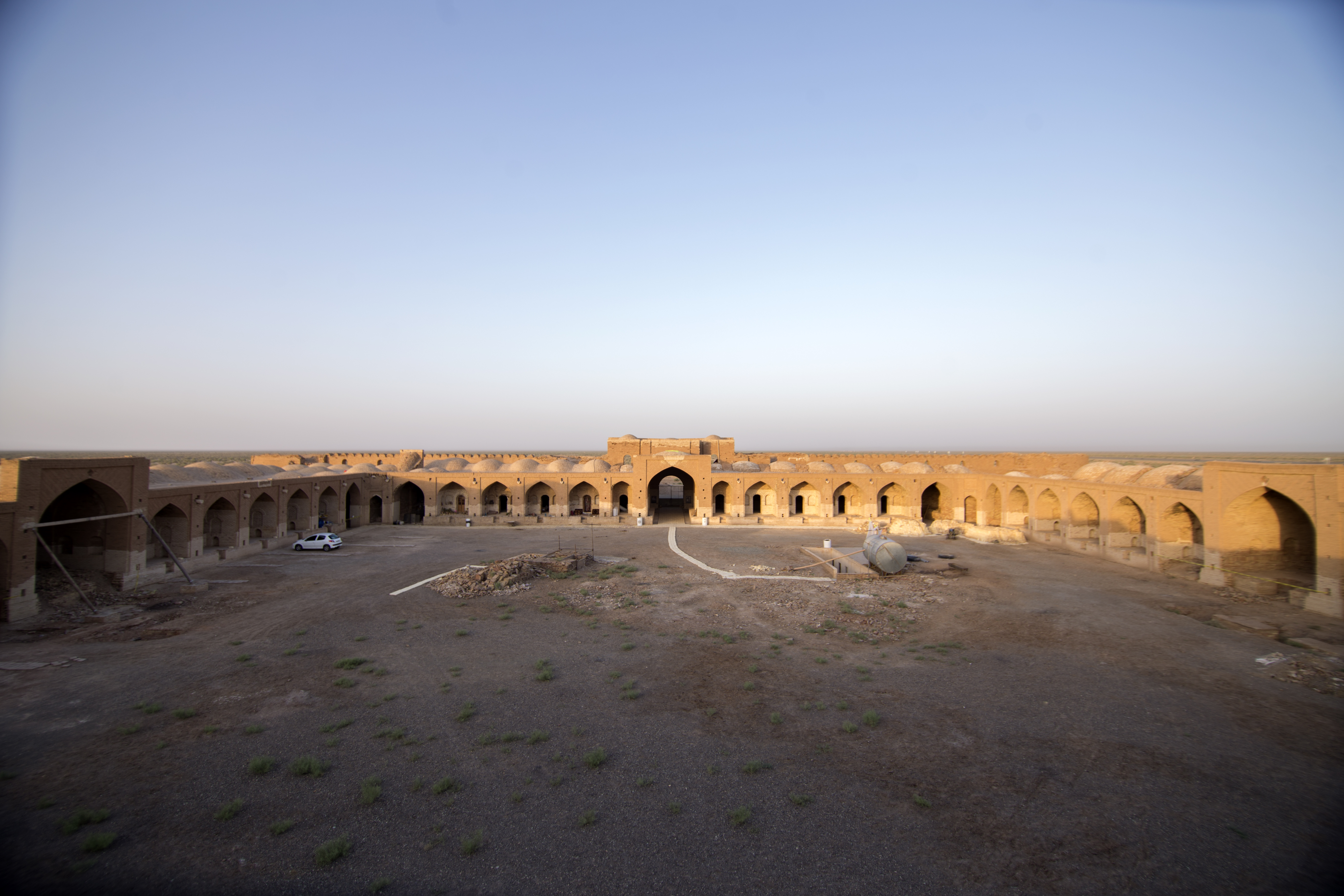 کاروانسرای دیر گچین یکی از بزرگ‌ترین کاروانسراهای ایران و دارای ویژگی‌های منحصربه‌فردی است که با بناهای مشابه، تفاوت دارد و باعث شده آن را مادر کاروانسراهای ایران بنامند. معماری این کاروانسرا مربوط به دوره ساسانی و صفوی است و در شهرستان قم، بخش مرکزی، ۸۰ کیلومتری شرق قم (کیلومتر ۶۰ بزرگراه گرمسار) و ۳۵ کیلومتری جنوب‌غربی ورامین واقع شده‌است. این اثر در تاریخ ۱ مهر ۱۳۸۲ با شمارهٔ ثبت ۱۰۴۰۸ به عنوان یکی از آثار ملی ایران به ثبت رسیده‌است